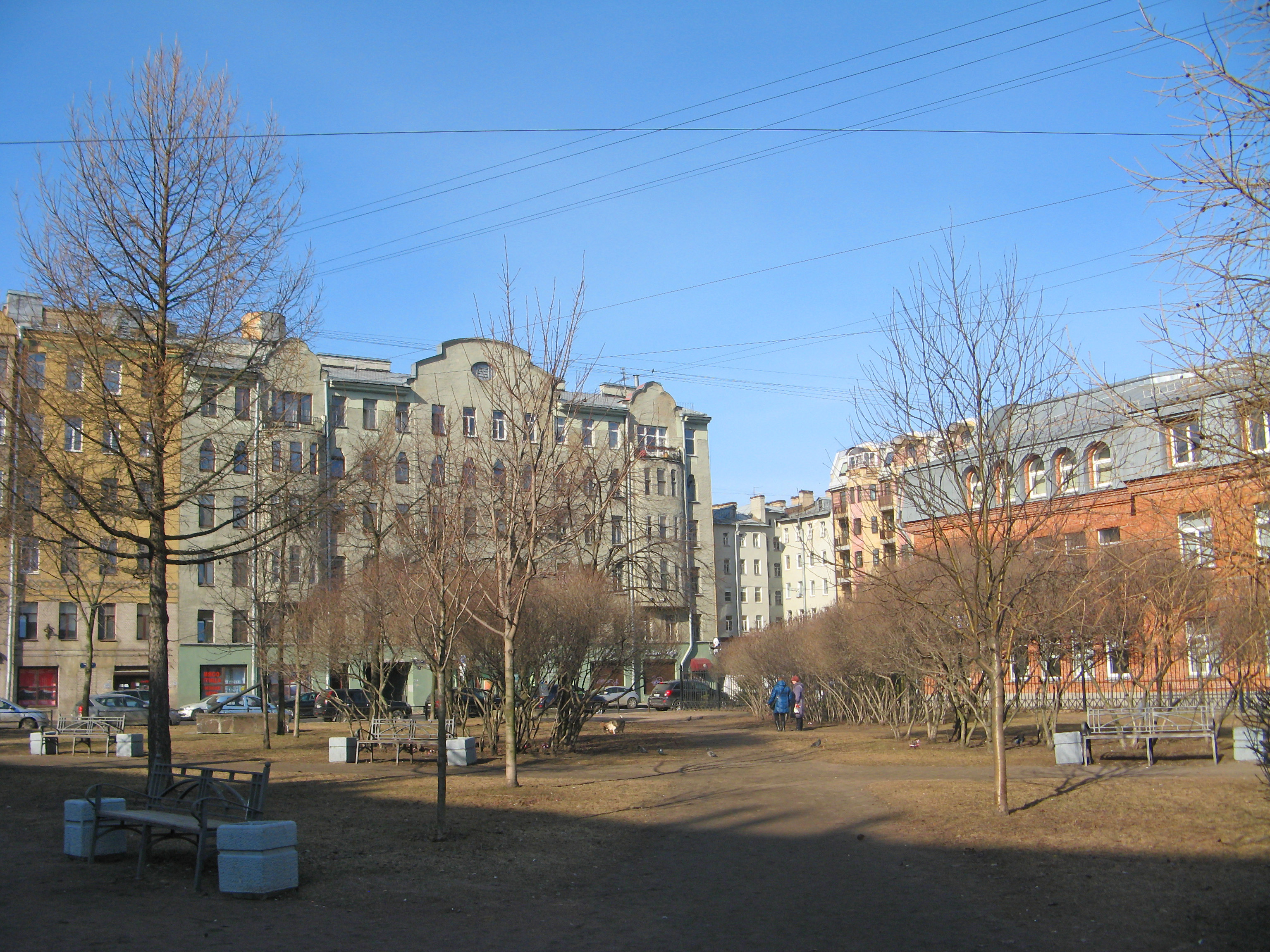 Сквер на углу Большого проспекта В.О. и Гаванской улицы, Санкт-Петербург